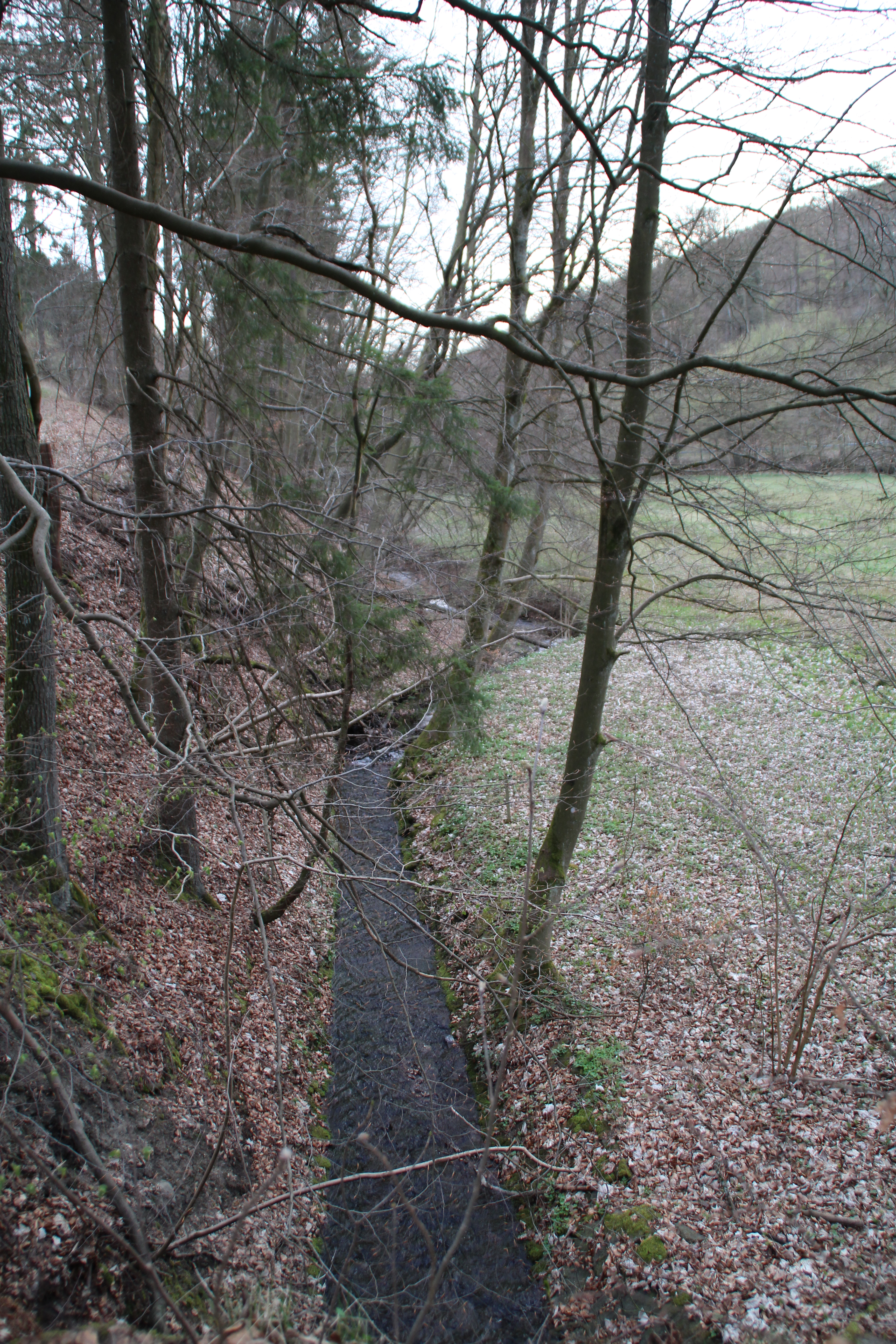 Hirschbach - etwa 150 m vor der Mündung in den Siegbach. Der Siegbach fließt wenige Meter rechts parallel außerhalb des Bilds